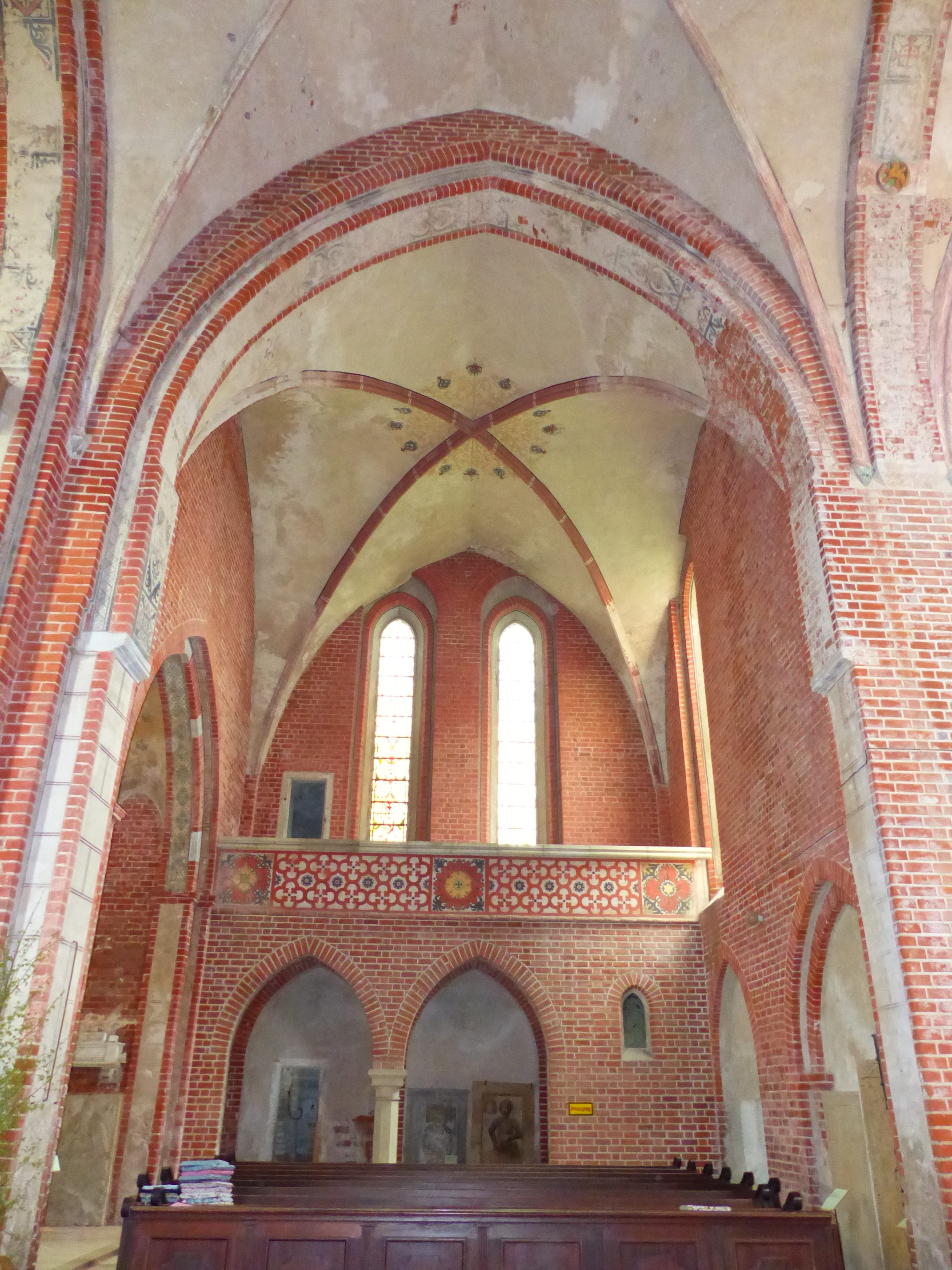 Klosterkirche St. Maria (Mühlberg an der Elbe), Brandenburg